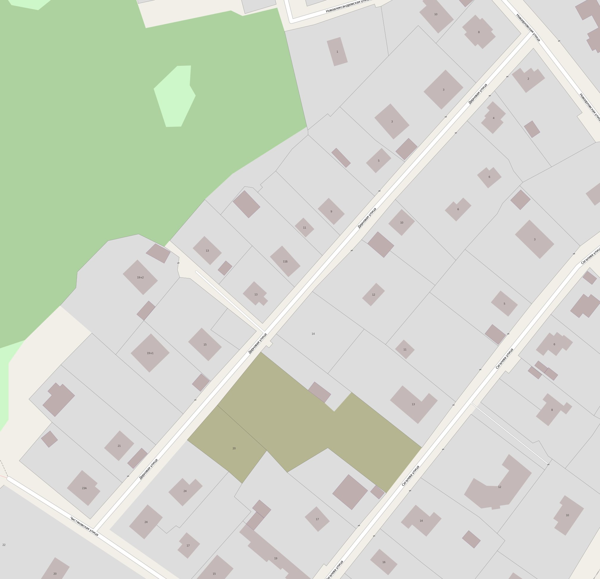 Карта Дерновой улицы. Санкт-Петербург.